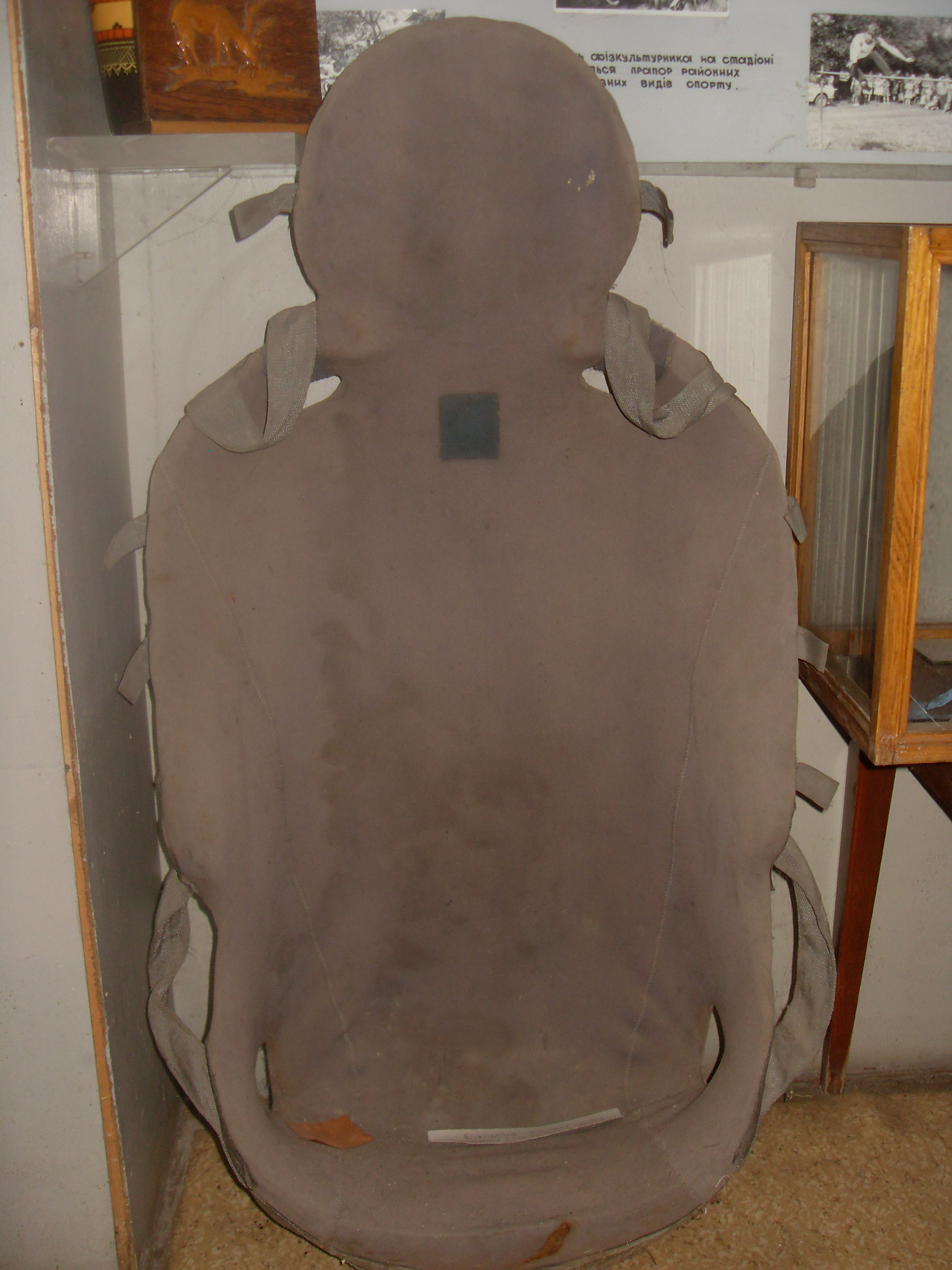 Ложемент космонавта Арцебарського Анатолія Павловича